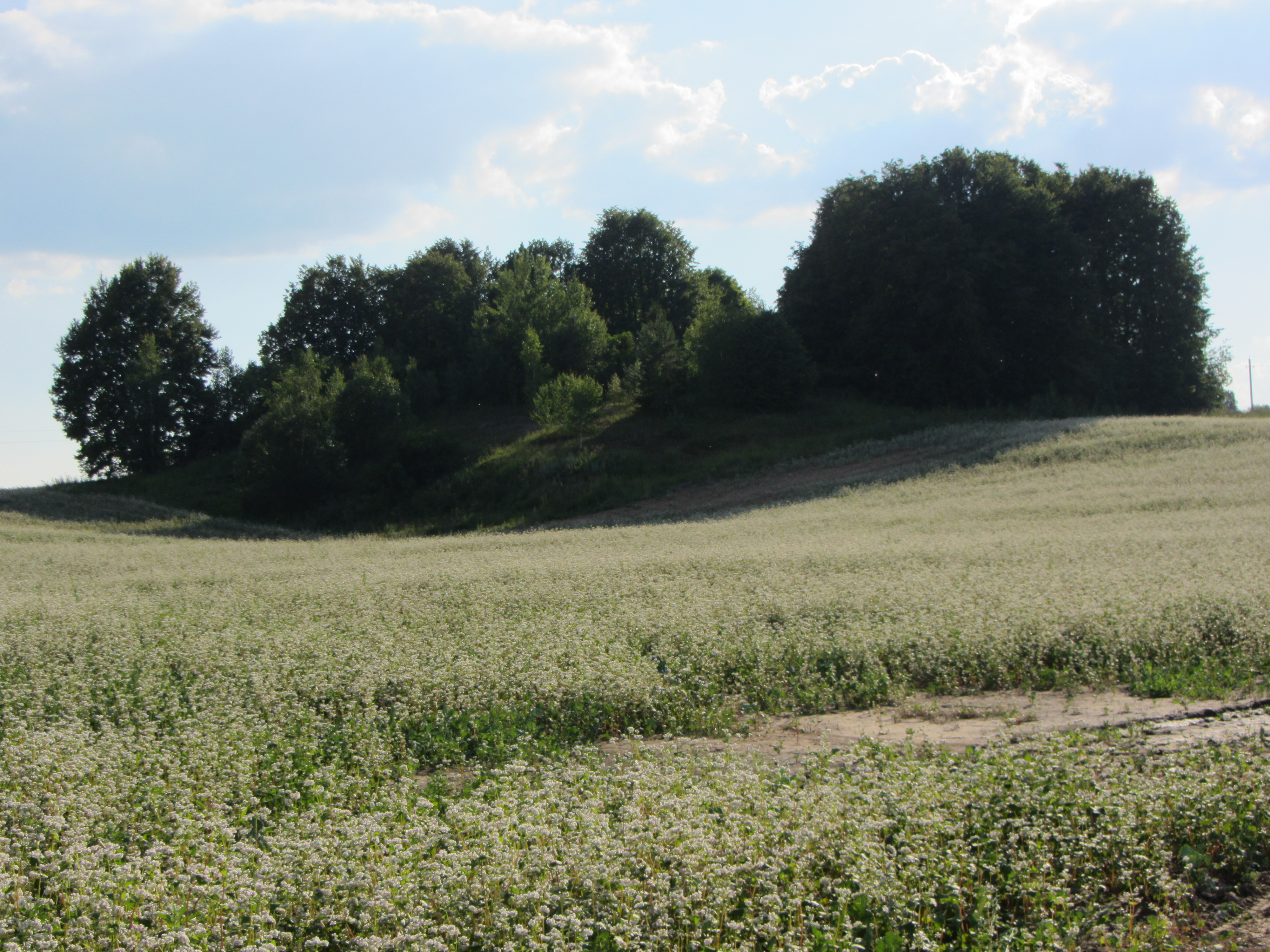 Беларуская (тарашкевіца): Гарадзішча раньняга жалезнага веку зь сямейным пахаваньнем Ельскіх ва ўрочышчы Кобань, побач з Дудзічамі